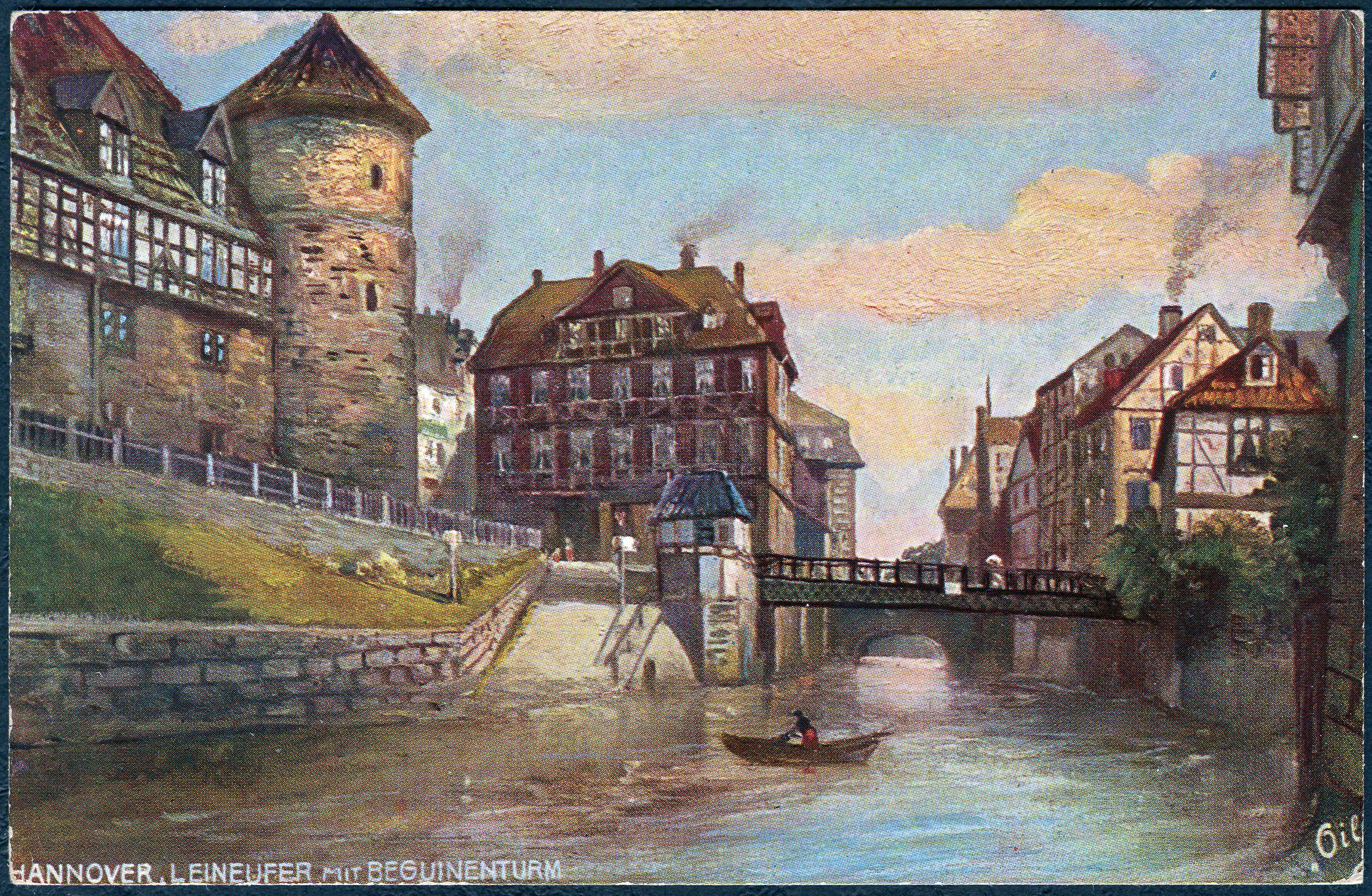 Eine "Oilette" der Firma Raphael Tuck & Sons mit einem Blick über die Leine zum Beginenturm mit dem ehemaligen Zeughaus, rechts davon das sogenannten Brückenhauschen oder auch Scherenschleiferhäuschen zwischen der Pferdeschwemme und der Sommerbrücke, die die Pferdestraße der Altstadt über die Leineinsel Klein-Venedig mit der Calenberger Neustadt verband ...